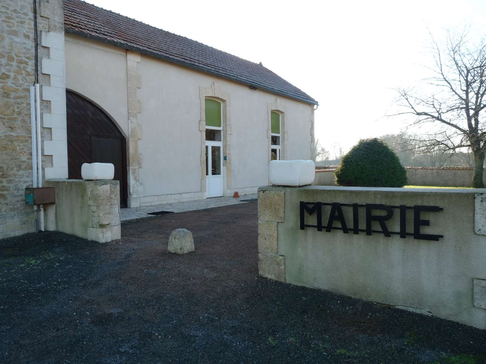 mairie de Lonnes, Charente, France